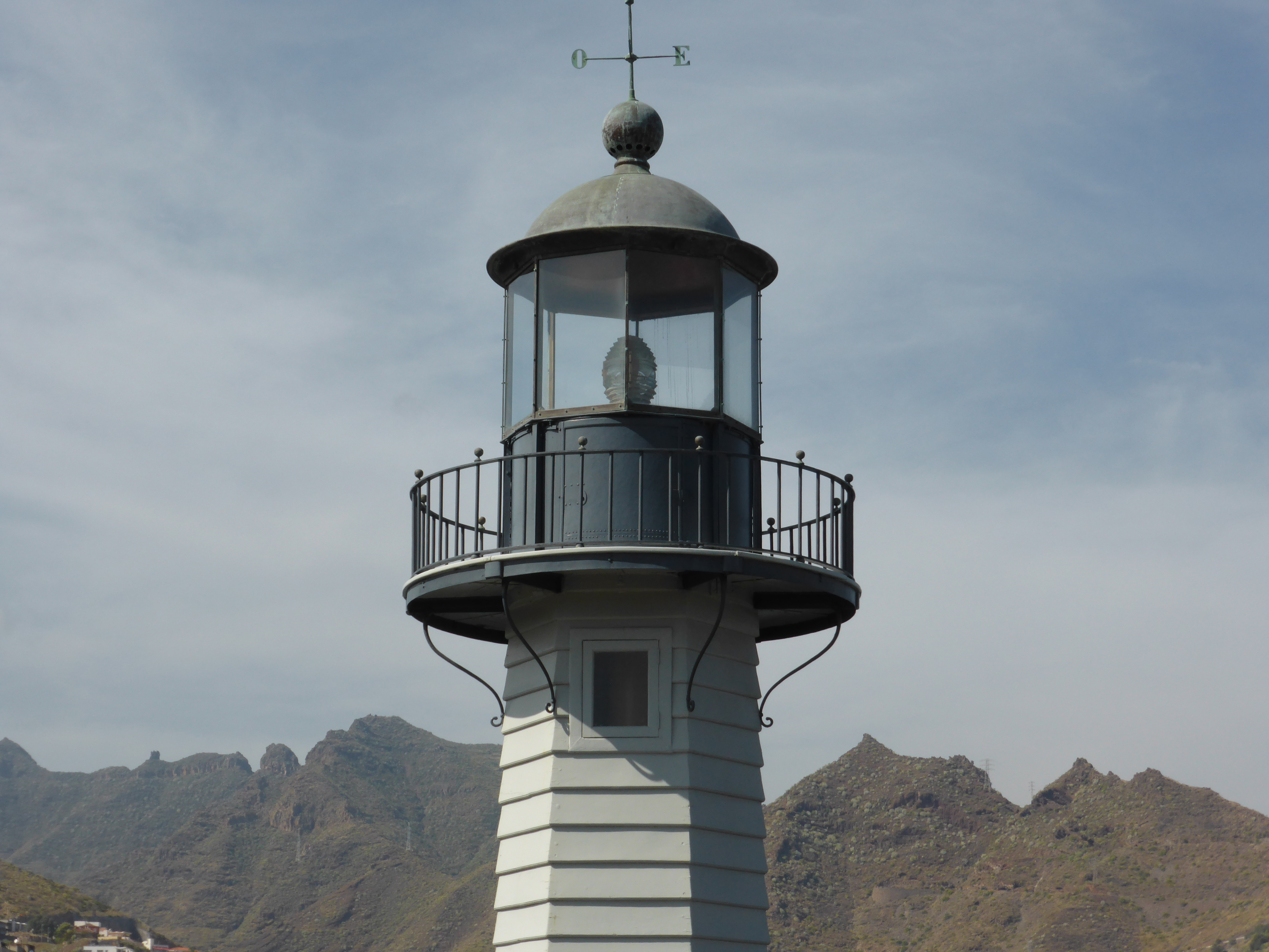 La Farola del Mar es un pequeño faro, o señal luminosa, que se encendió en diciembre de 1863, en el dique-muelle sur del puerto de Santa Cruz de Tenerife (entonces capital de la provincia de Canarias). Actualmente es una pieza histórica. En la música popular canaria es citada así: "Esta noche no alumbra la farola del mar..."